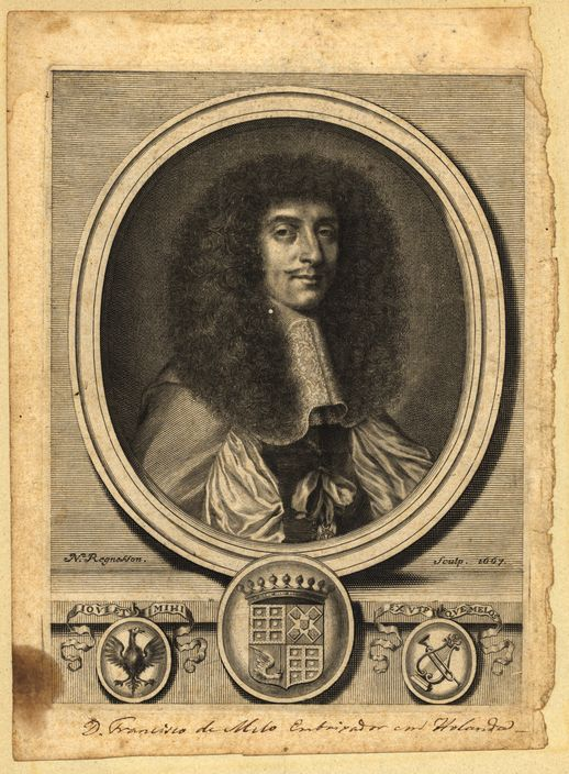 Protrait de Francisco de Melo